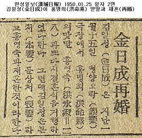 김일성(金日成)이 홍명희(洪命熹) 맏딸과 재혼(再婚)했다는 한성일보(漢城日報) 1950.01.25 일자 2면 기사